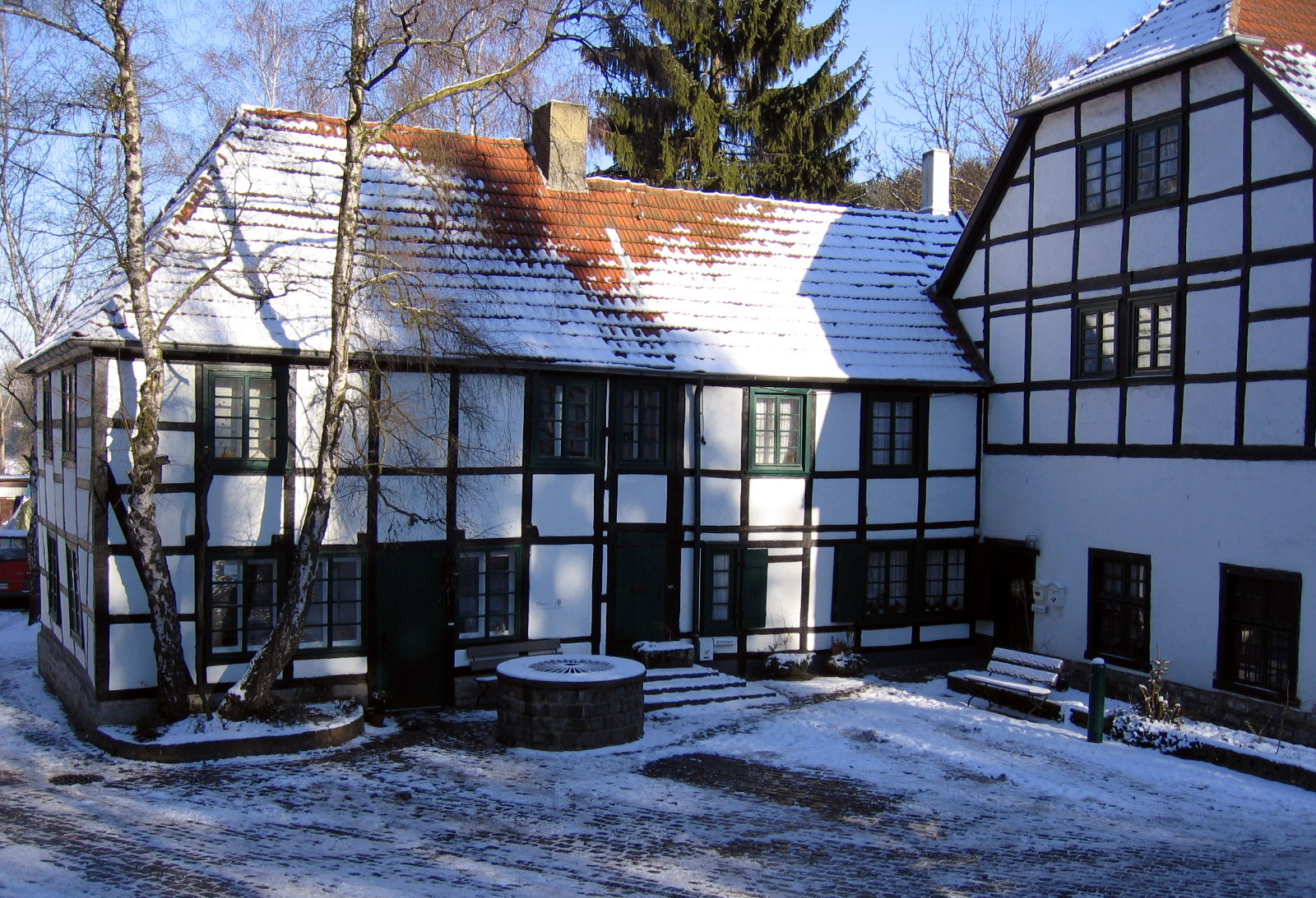 Description: Historische Fabrikenanlage Maste-Barendorf (um 1850) in Iserlohn, Haus D (Ahlenschmiede) Source: selbst fotografiert Date: 29. Jan. 2006 Author: Bubo